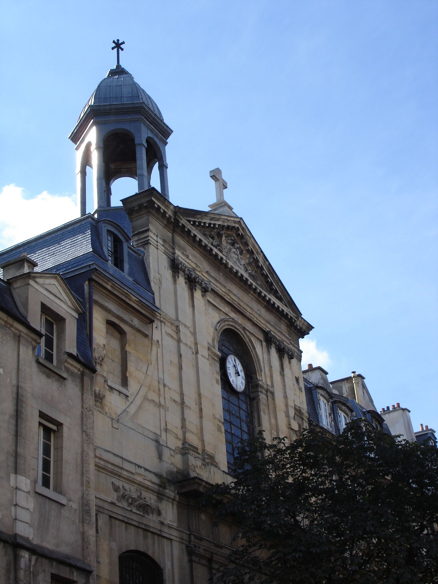 "Église des Billettes": Lutherian church, rue des Archives, Paris (Detail)